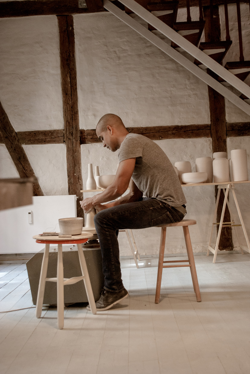 Eric Landen at Work in the Tortus Copenhagen Studio at Kompagnistræde 23 in Copenhagen, Denmark